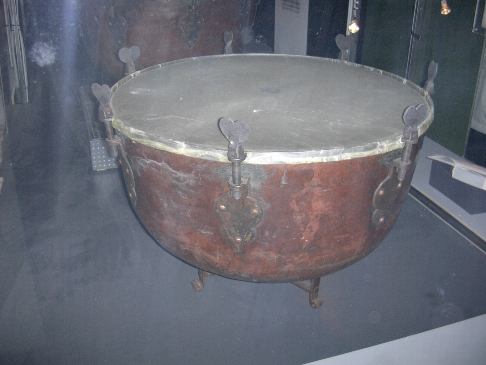 Alte Form der Pauke